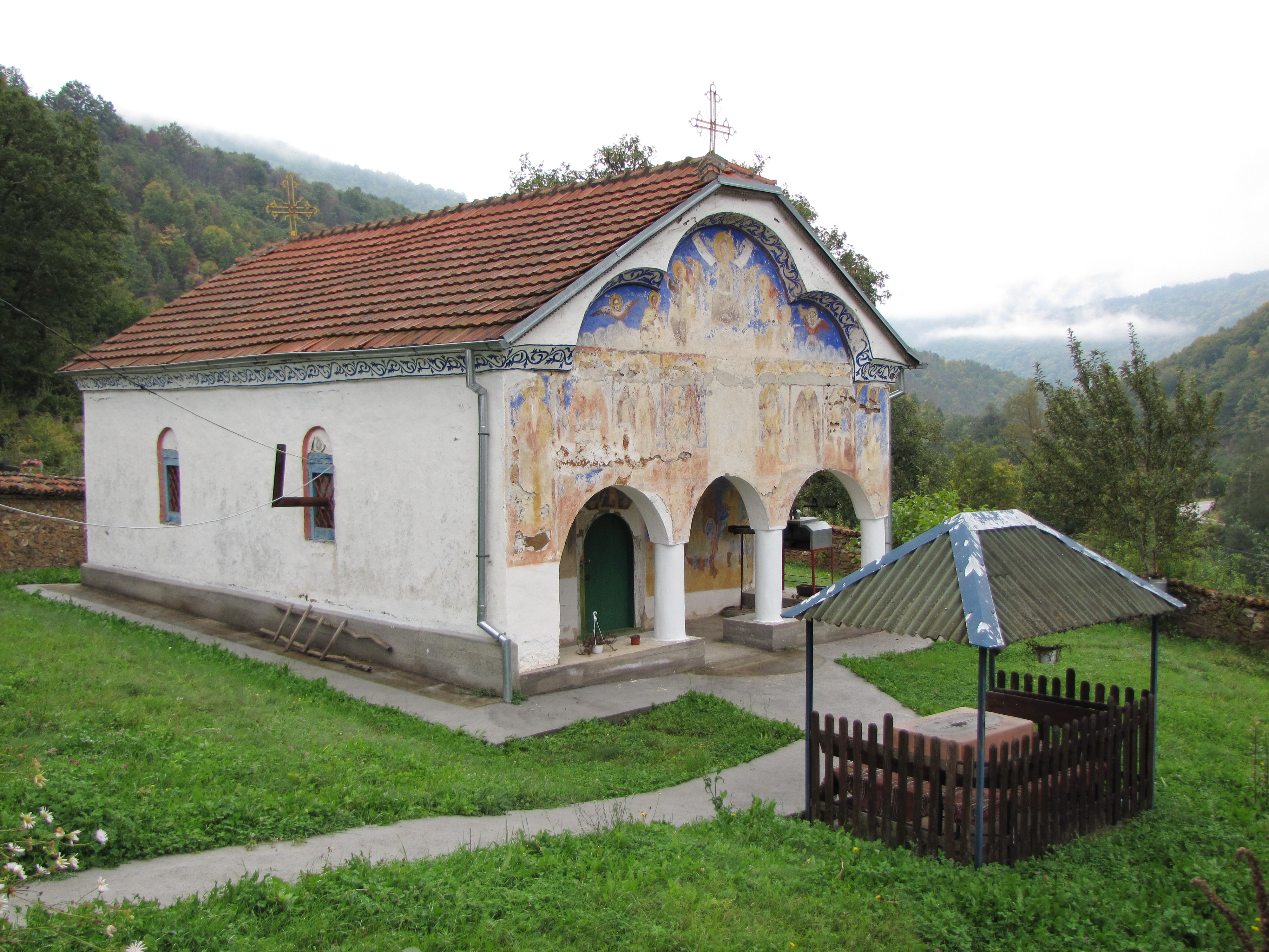 Црква св. Петке (Параскеве) у Рибарцима.